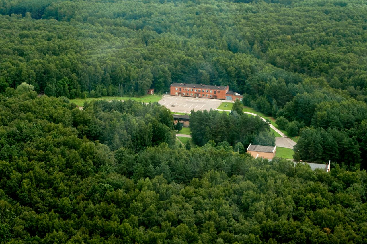 Лаборатория измерений и испытаний Московского метрополитена (ныне учебный пункт пожарно-спасательных сил МЧС России) в Тропаревском лесопарке. Конечная станция линии Д6 (Метро-2).